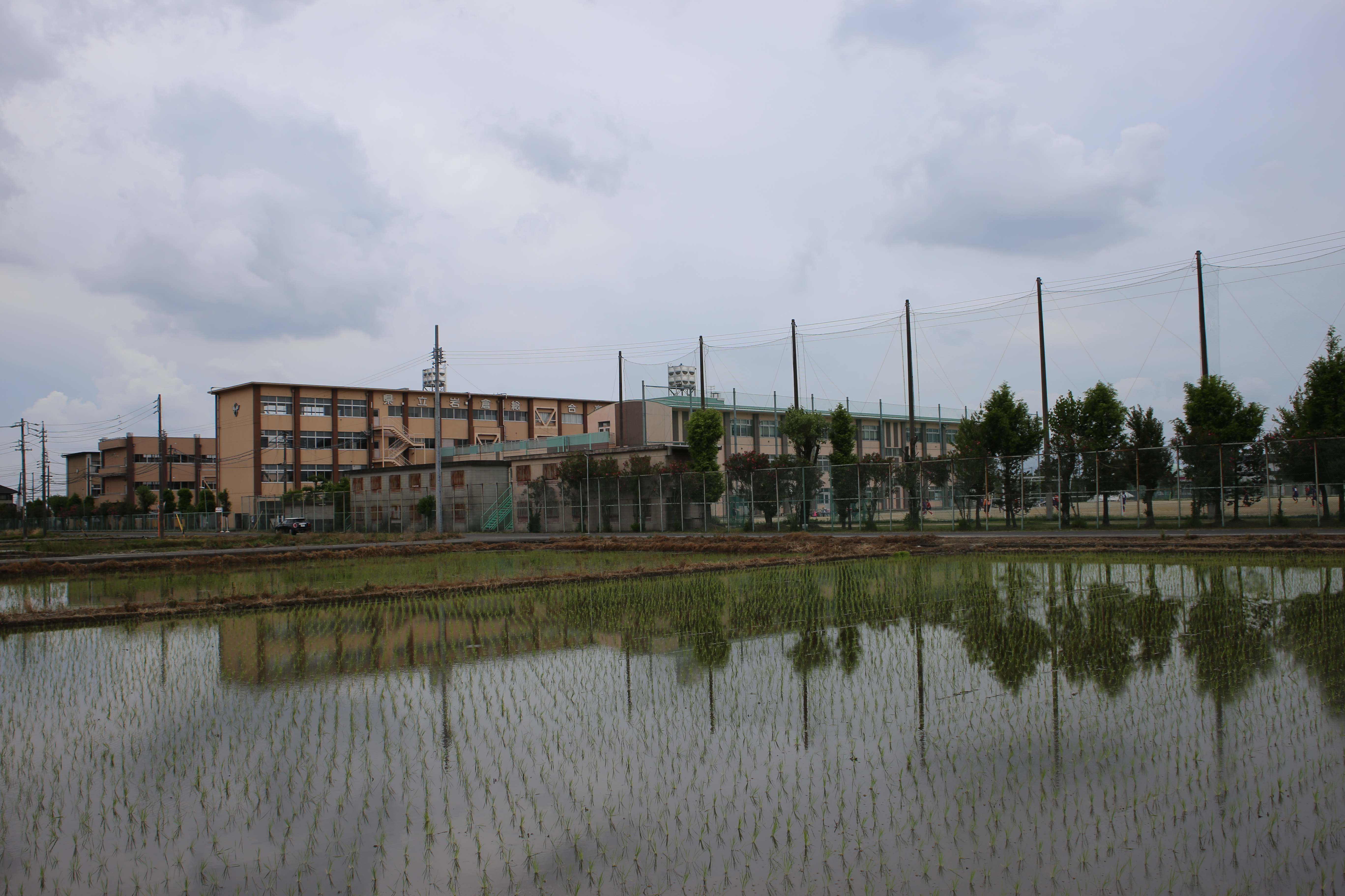 愛知県岩倉市北島町川田の愛知県立岩倉総合高等学校を東側公道より撮影